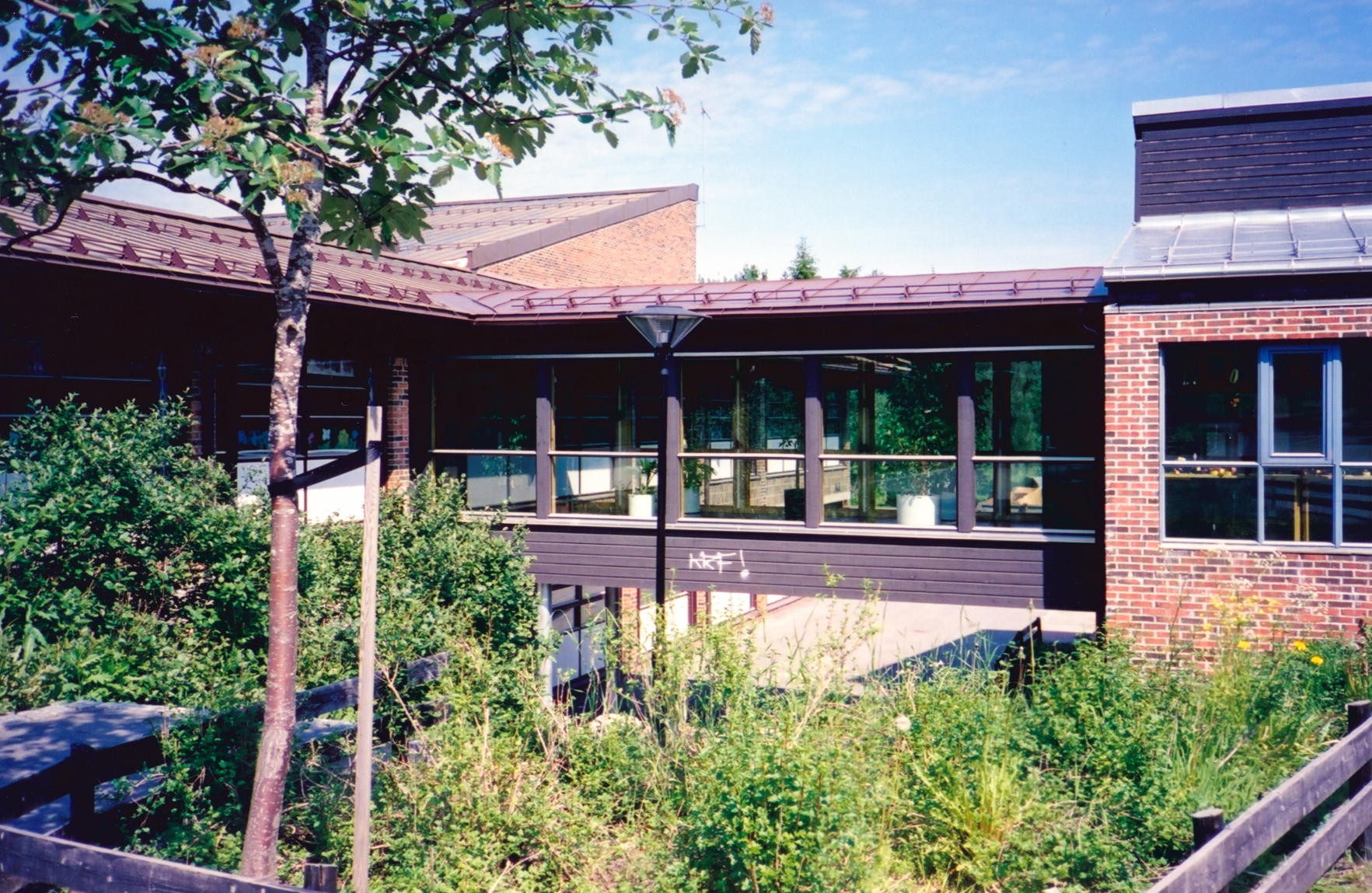 Format: Fotopositiv Dato / Date: 2003 Fotograf / Photographer: Byantikvaren Sted / Place: Anders Wigens veg 3, Byåsen, Trondheim Dalgård skole og ressurssenter: Skolens historie Eier / Owner Institution: Trondheim byarkiv, The Municipal Archives of Trondheim Arkivreferanse / Archive reference: Byantikvaren - Skoler i Trondheim 2003 - A1.S1.BC043 Dalgård skole, Anders Wigens veg 3, barneskole (1.-7. trinn) med tilrettelagt undervisning for funksjonshemmede elever, åpnet 1978; 550 elever (2007). Skolebygningen og internatet ble oppført 1977-78 (ark. Einar Myklebust). 1998 ble skolen ombygd og påbygd (ark. Hus Arkitekter). Skolen åpnet 1978 som en spesialskole, og den var en etterfølger etter Bakklandet spesialskole for evneveike. Skolen er i dag nærskole for elever i Dalgård skolekrets, men den gir også tilbud om undervisning i spesialgrupper til elever med store og sammensatte hjelpebehov fra 1.-10. trinn. Elevene kommer fra Trondheim og omegn. Skolen har dessuten skolefritidstilbud som inkluderer både nærskolen og spesialgruppene. Elever i spesialgruppene har undervisningstilbud på Dalgård skole fra 2-5 hele dager per uke. Det utarbeides individuelle opplæringsplaner for hver elev. Disse elevene kan få hele eller deler av sin skolegang på Dalgård. Skole har spesialkompetanse innenfor logopedi, ergoterapi, helsesport, musikkterapi, friluftsliv og svømming. Utenfor skolen står bronsestatuen "Nusse på gyngehest" av Astrid Dahlsveen. Kilde: Terje Bratberg: Trondheim byleksikon (Oslo 2008) s. 132.